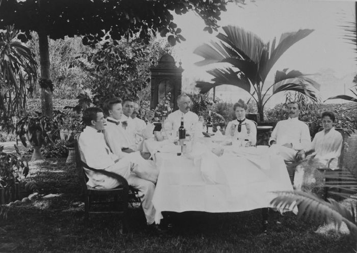 foto. Medewerkers van de suikerfabriek Karang Soewoeng nemen in een tuin deel aan een rijsttafel ter gelegenheid van het afscheid van fabricatiechef W. Janssen